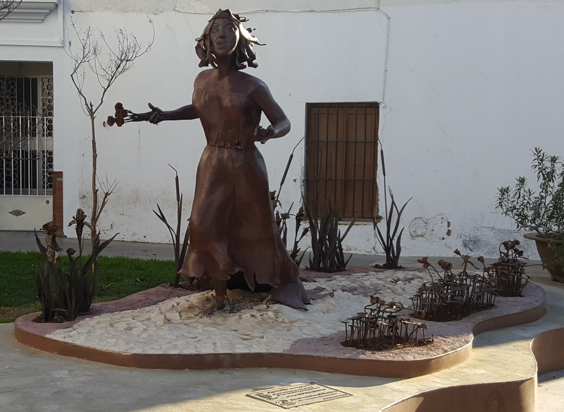 Escultura perteneciente al Museo al aire libre Moguer EScultura de Moguer, Andalucía (España). Escultura incluida en la serie PlateroEScultura con el nombre "Aguedilla".